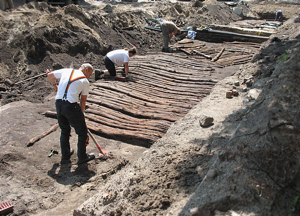 Ausgrabung eines Knüppeldamms aus dem 16. Jahrhundert unter der Breiten Straße in Oranienburg